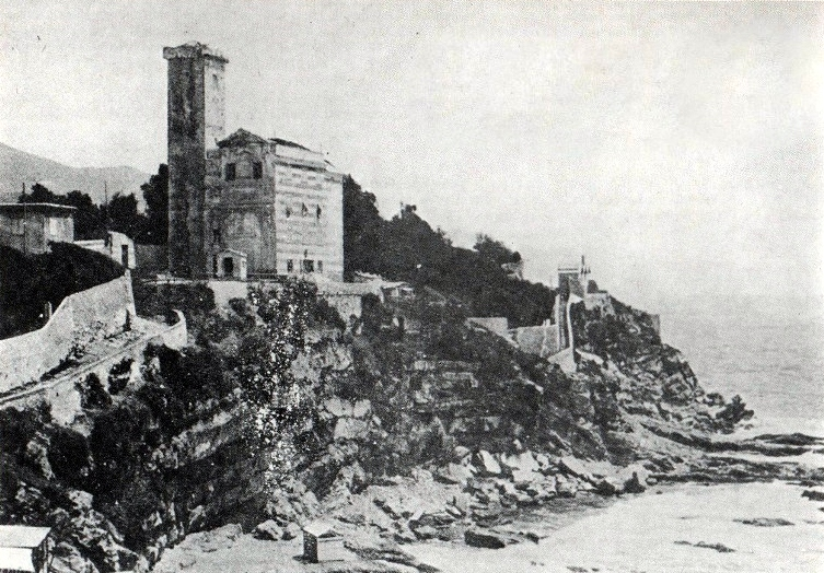 Fotografia del XIX secolo dell'antica chiesa dei Santi Nazario e Celso prima della demolizione per la realizzazione di Corso Italia ad Albaro, Genova, Liguria